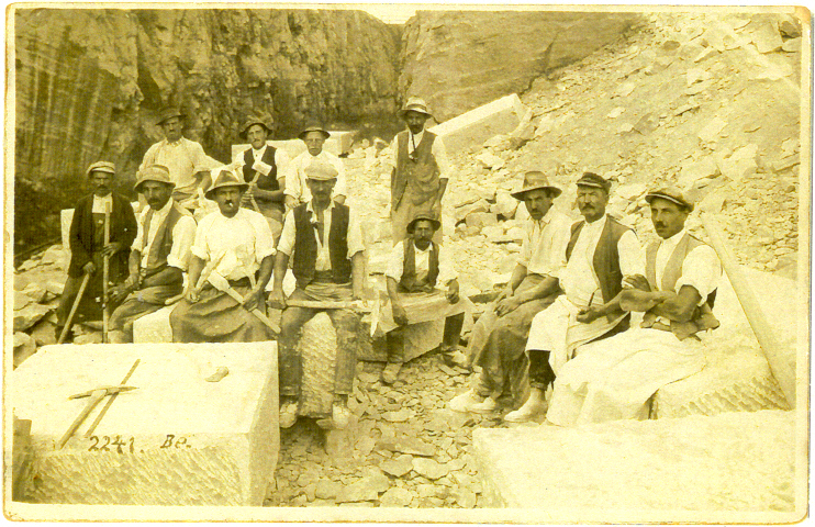 Historisches Bild welches die Arbeiter im Steinbruch St. Margarethen und ihre Werkzeuge zeigt